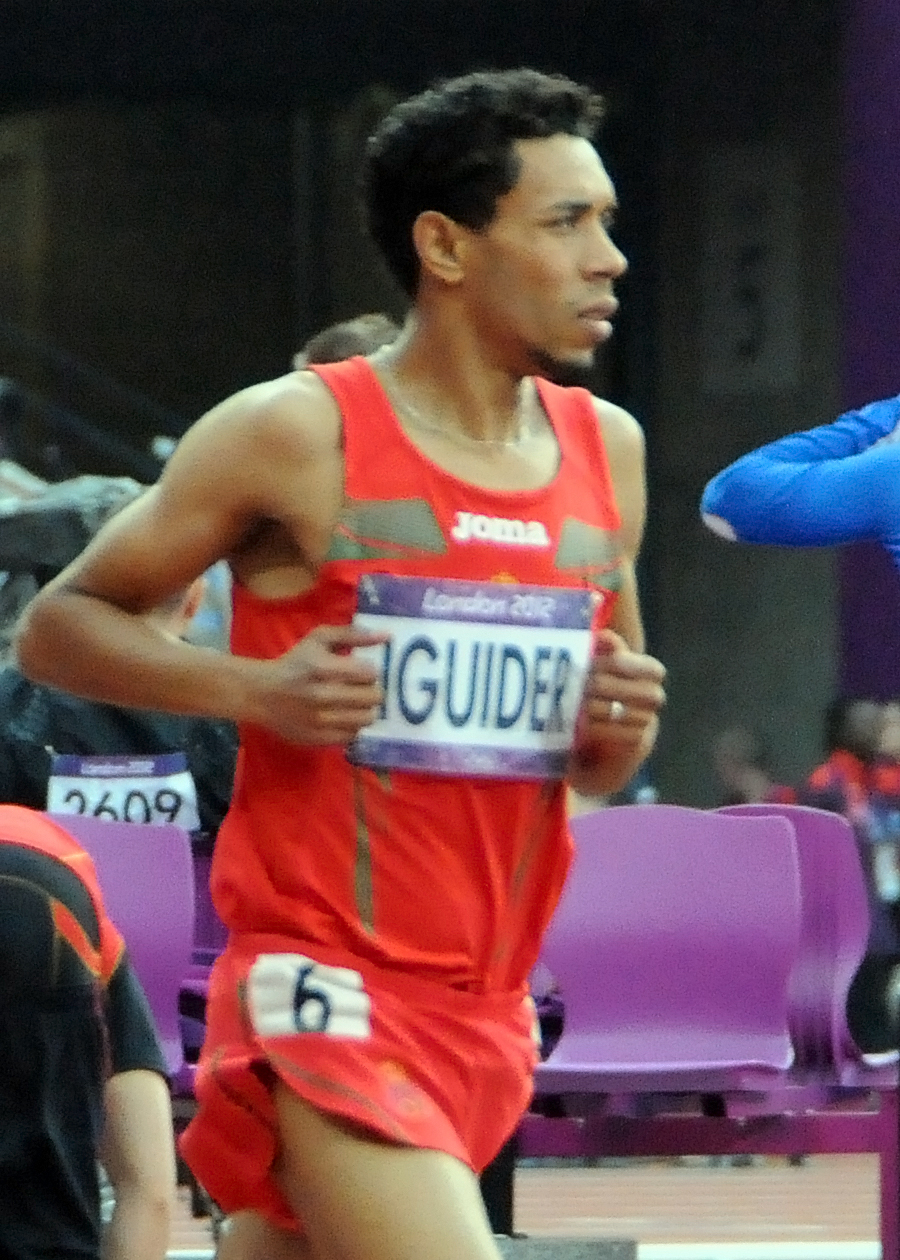 L’athlète marocain Abdalaati Iguider lors du 5000m des jeux olympiques de Londres